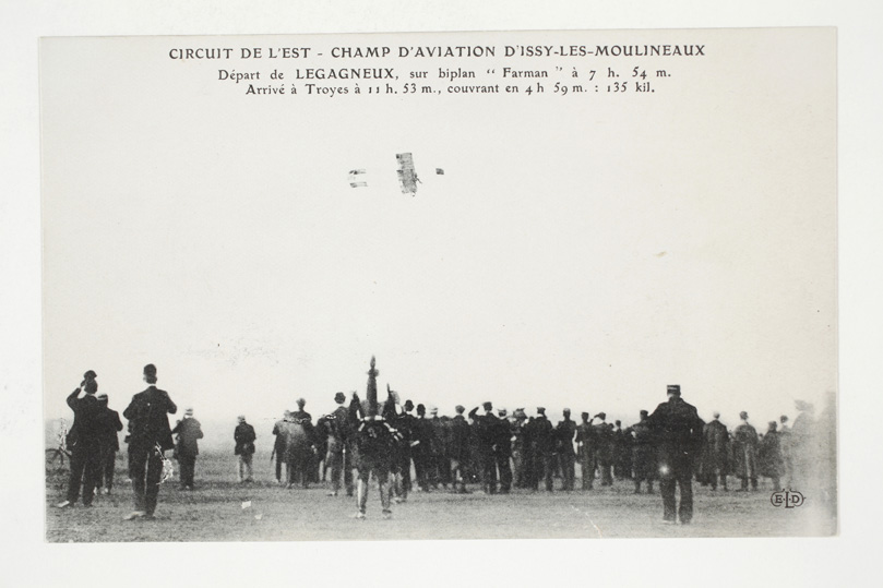 Circuit de l'Est - Champ d'Aviation d'Issy-les-Moulineaux - Départ de Legagneux sur biplan "Farman" à 7 h. 54 m. Arrivée à Troyes à 11 h 53 m. couvrant en 4 h. 59 m. : 135 kil. Circuit en boucle, du 7 au 17 août 1910, reliant les villes de Troyes, Nancy, Charleville-Mézières, Douai et Amiens. Sur la photographie, à l'arrière-plan: l'actuel boulevard Gallieni Adresse actuelle: 1 rue du Colonel Pierre Avia Date : 1910